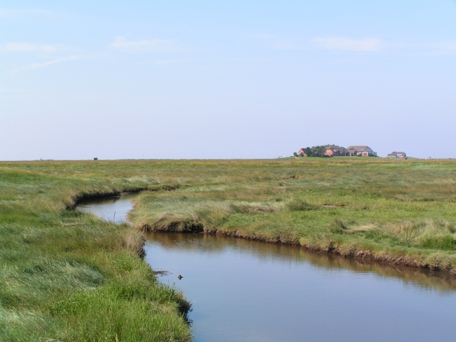 Hallig Langeness in Germany Author:M.Buschmann